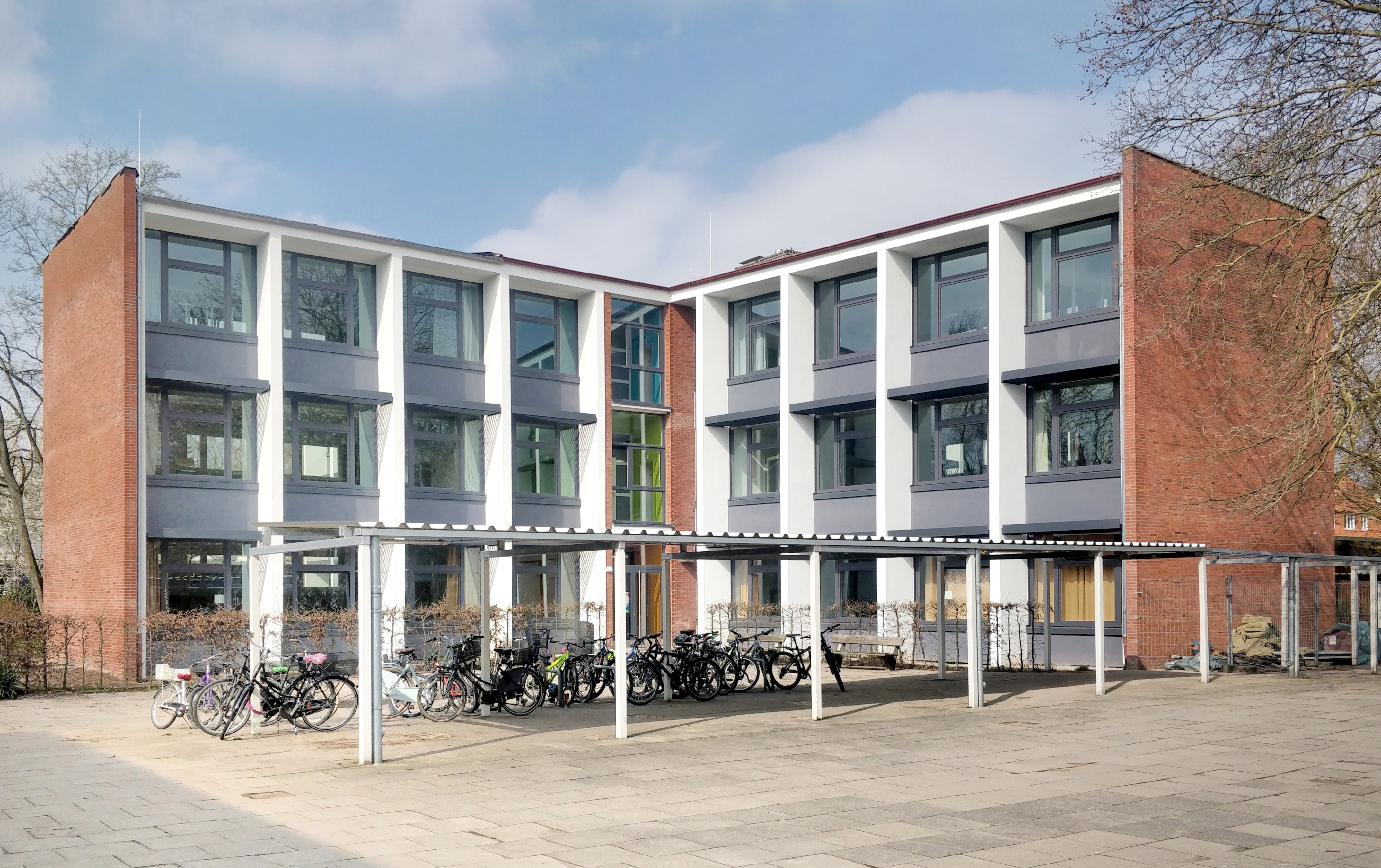 Kreuzbau am Gymnasium Corveystraße, Bild entzerrt